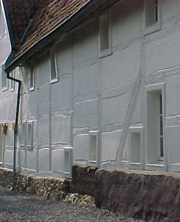 Limburgs: Vakwerkhoes in Vroële (Noorbeek)